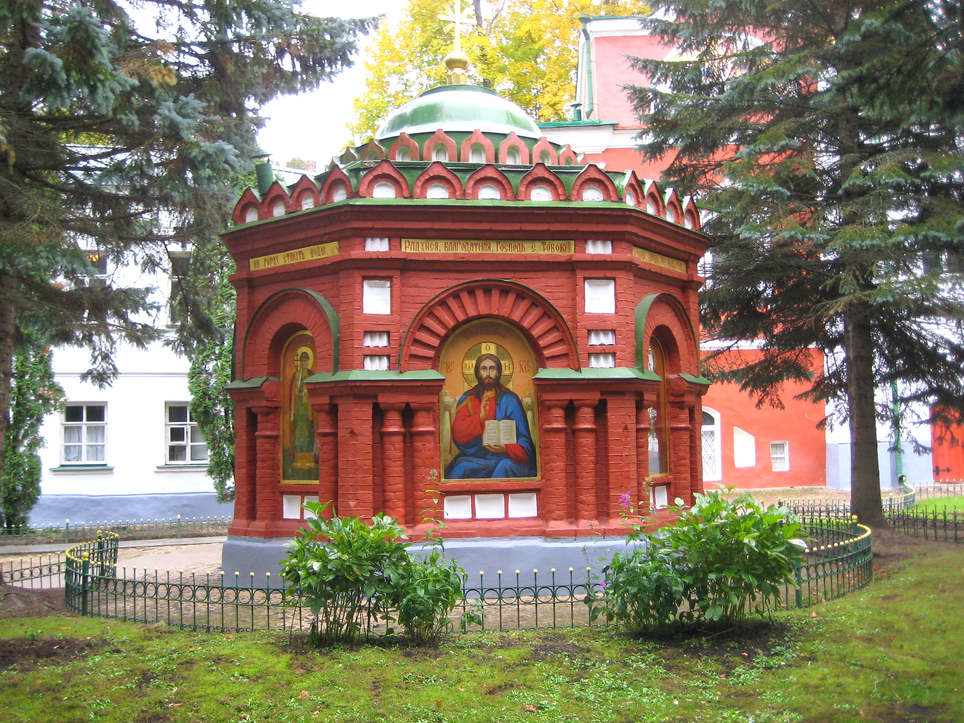 Печоры. Псково-Печерский монастырь. Часовня с артезианским колодцем.